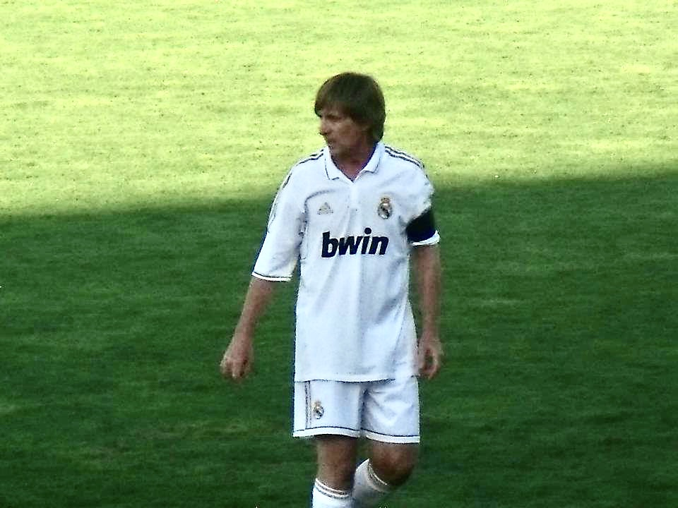 Playing football Veteran Real Madrid